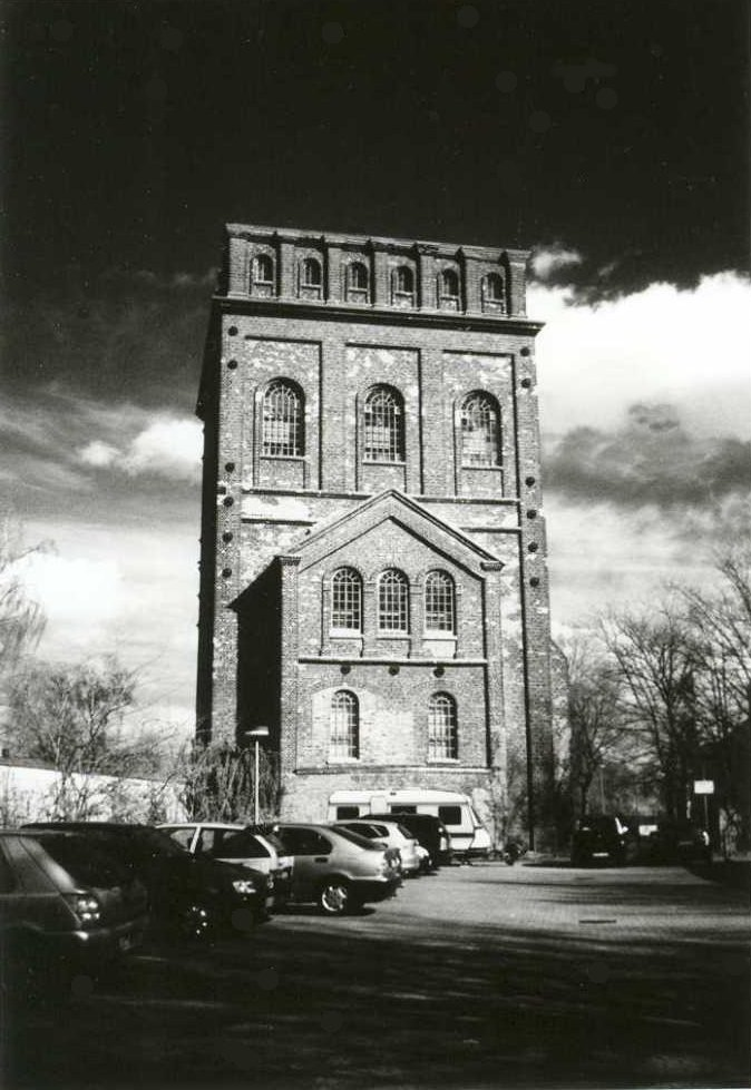 Der Malakow-Turm der Zeche Julius-Phillipp in Bochum